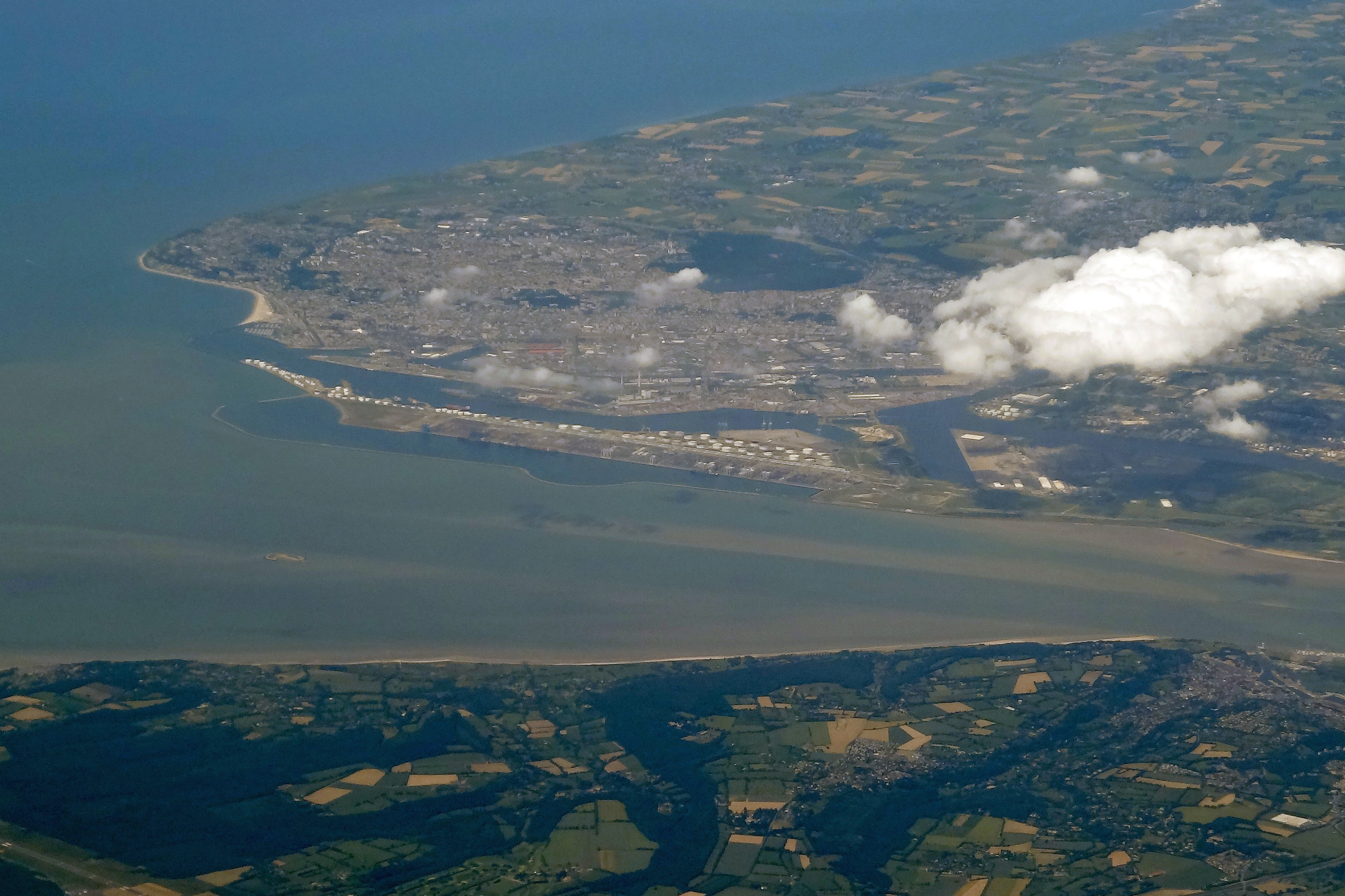 LE HAVRE FRANCE FROM N173DZ 767 DELTA FLIGHT CDG-EWR